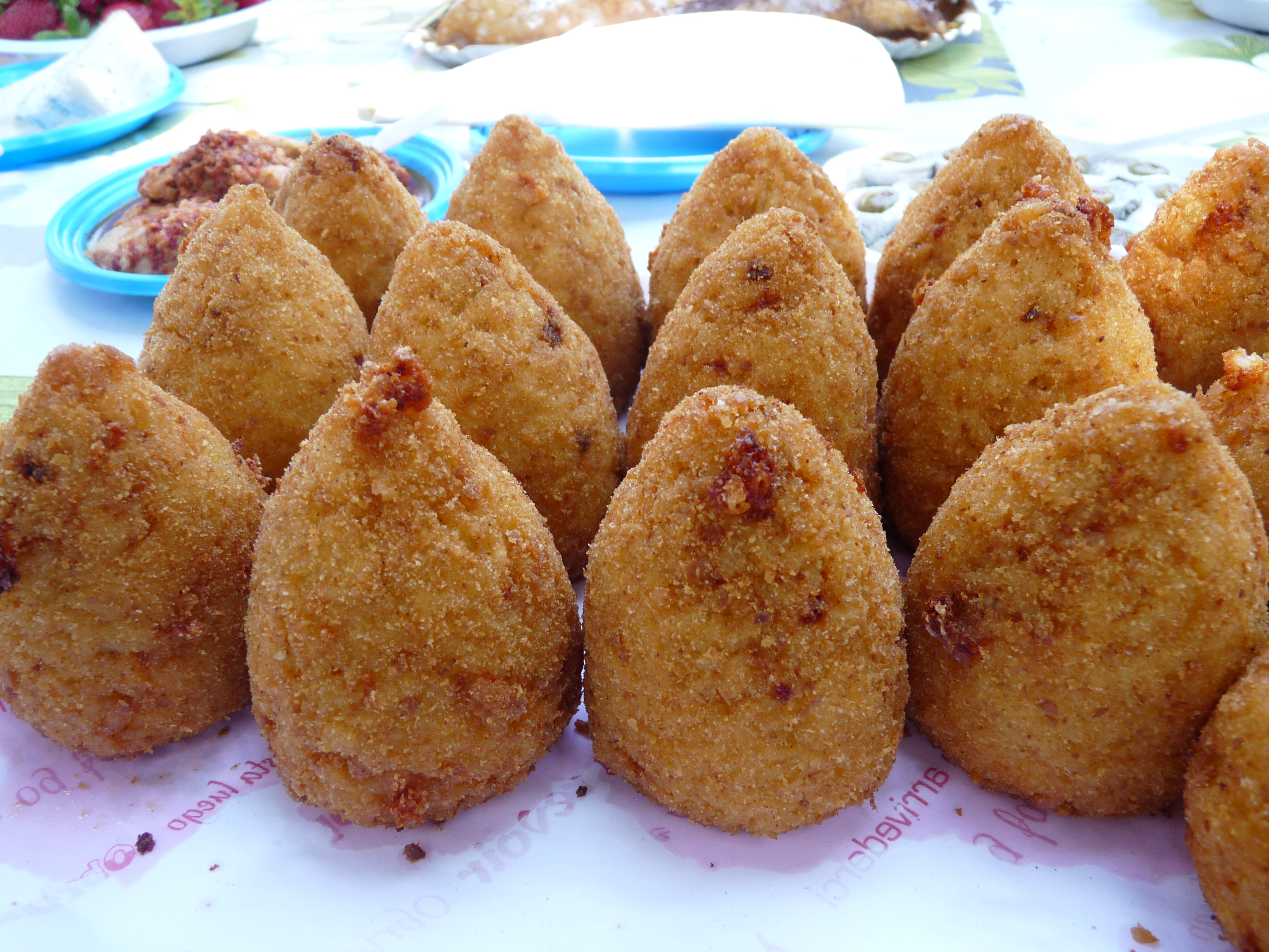 Arancini de Lipari (îles Eoliennes, Sicile)